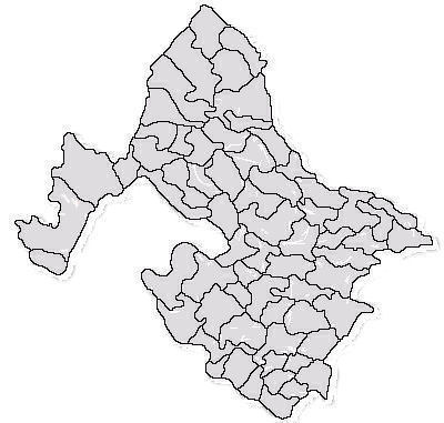 Categorie:Hărţi ale judeţului Mehedinţi